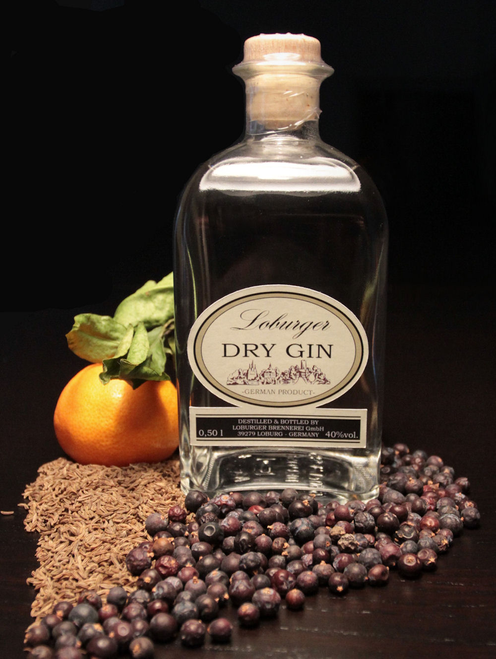 Erster GIN aus Sachsen-Anhalt